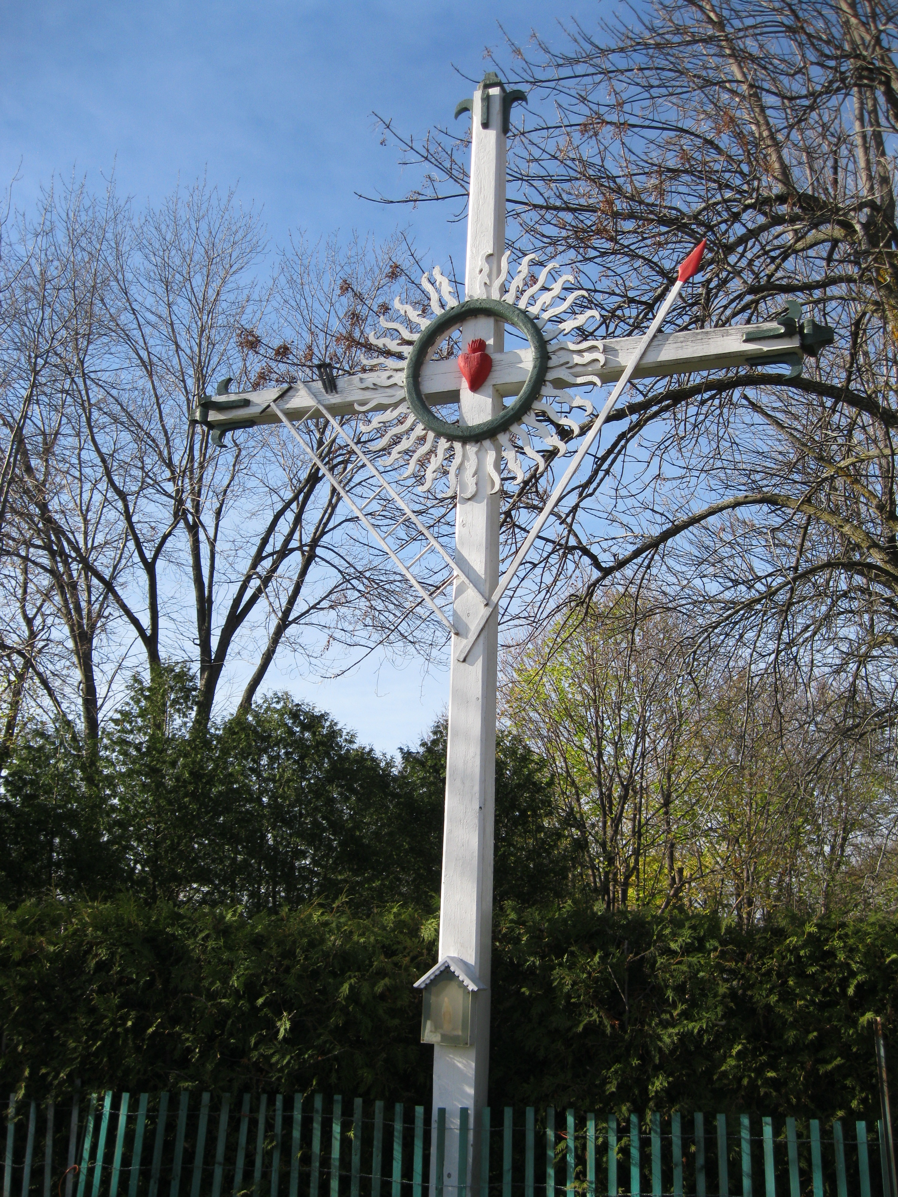 Croix de chemin du Bord-du-Lac 1859, chemin Bord-du-Lac, L'Île-Bizard, Montréal, Québec